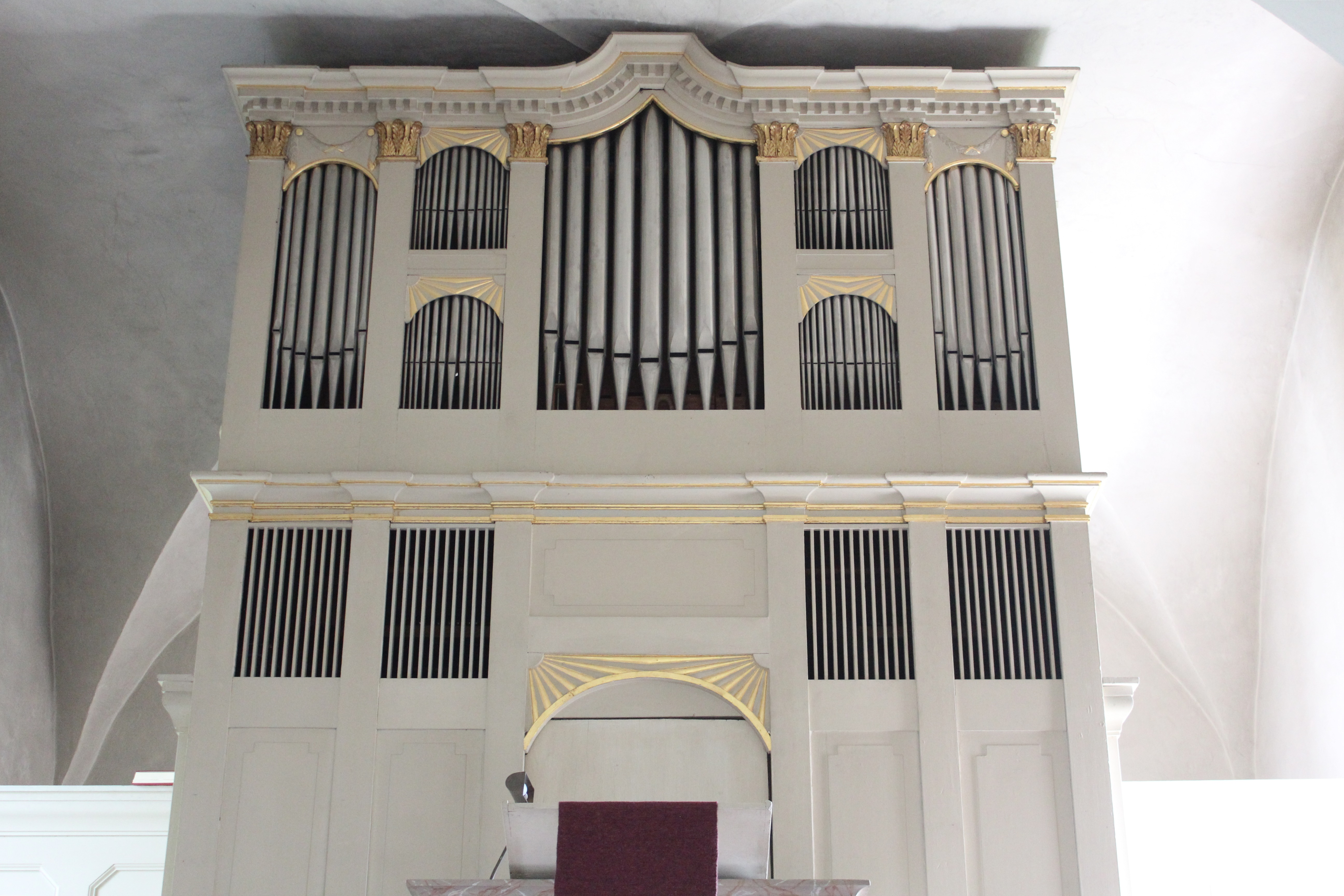 Johann-Hartmann-Bernhard-Orgel der evangelischen Kirche zu Wetzlar-Steindorf